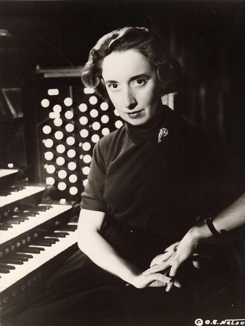 Jeanne Demessieux de visita a Estados Unidos, 1958.